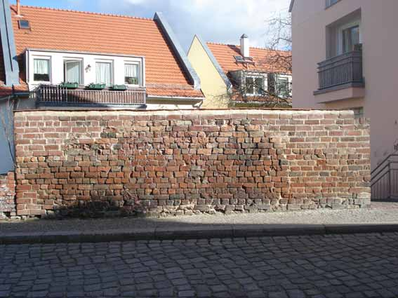 Die Stadtmauer der Neustadt Brandenburg an der Havel in Höhe des Deutschen Dorfes